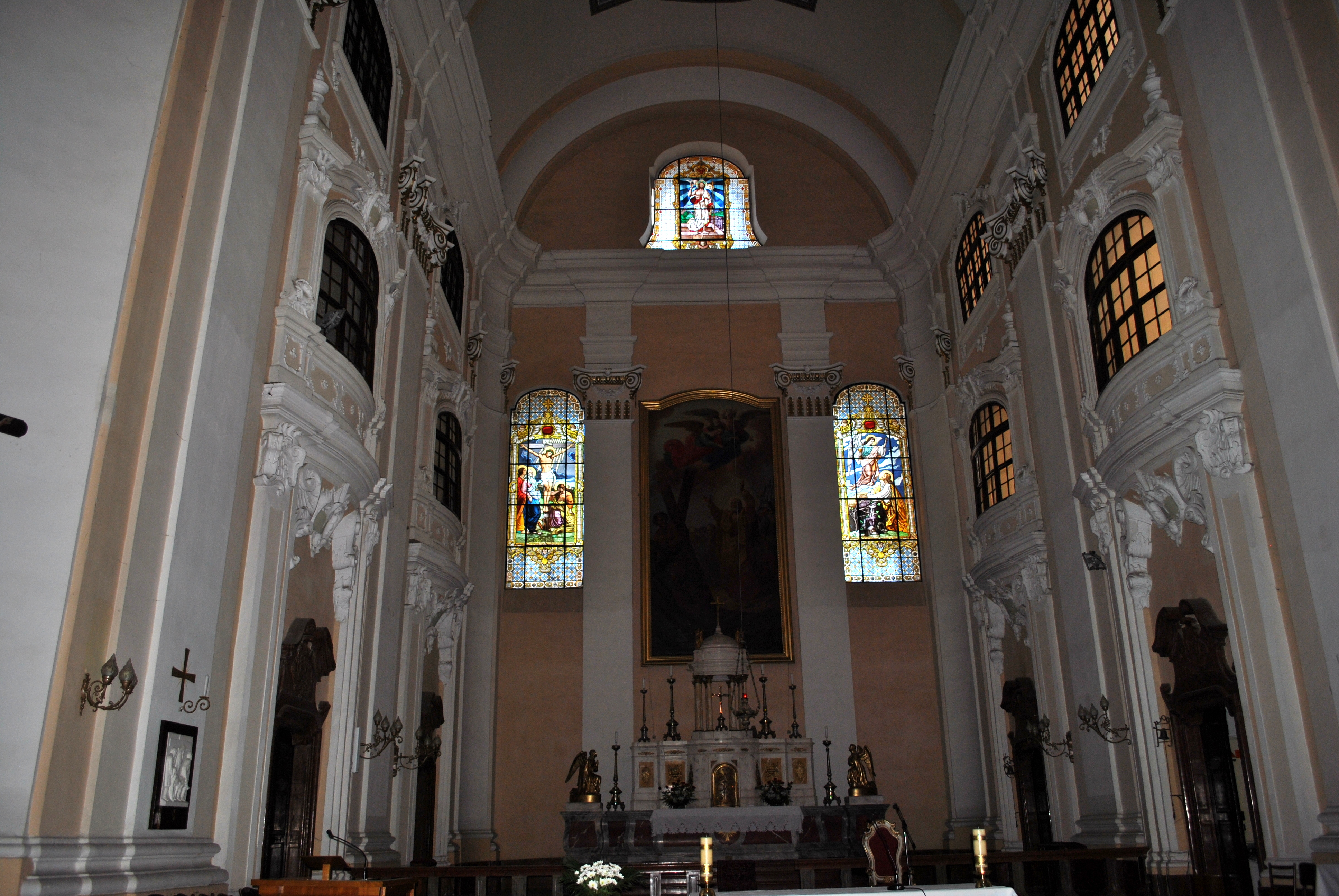 Komárom, szt. András templom belseje